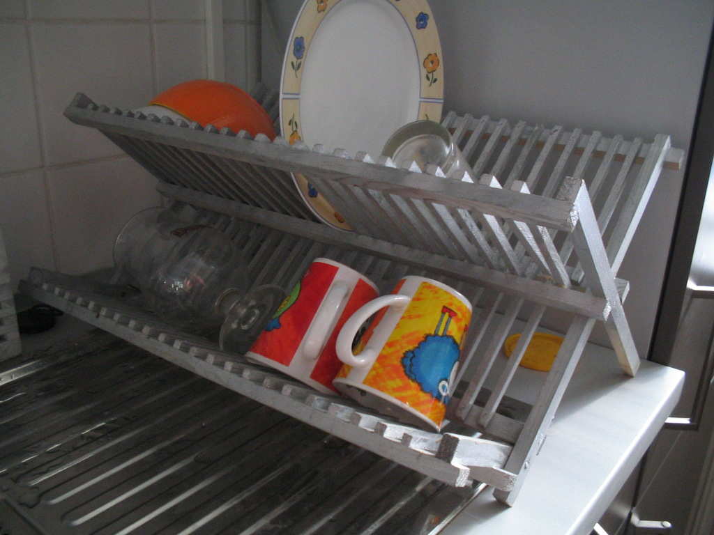 druiprek voor het afgewassen servies.